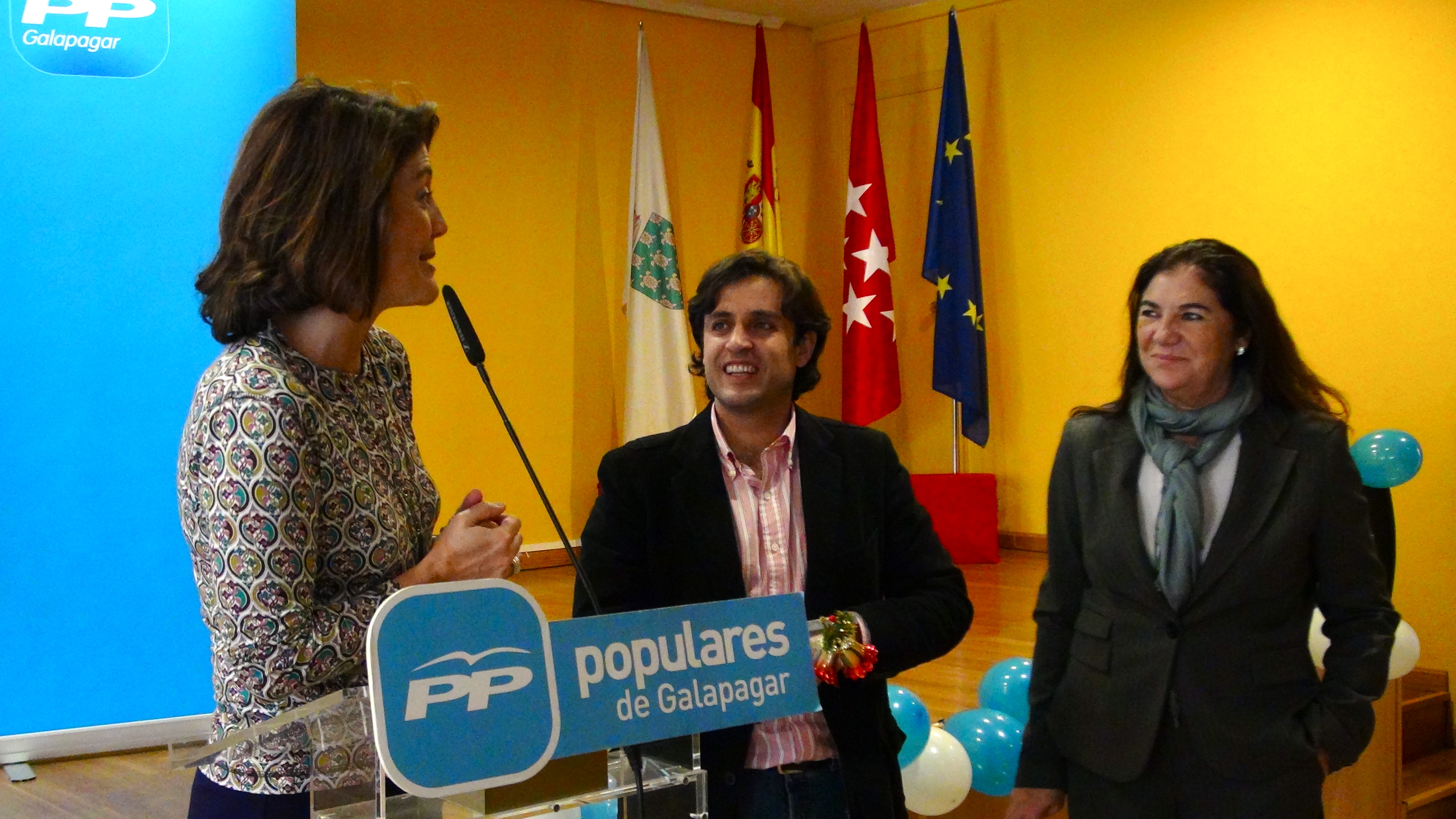 Un año más, el PP de Galapagar ha celebrado junto a afiliados y simpatizantes, la llegada de estas Fiestas Navideñas. Acompañado por la senadora por Madrid y vicesecretaria general del PP madrileño, Gádor Ongil, el Alcalde de Galapagar, Daniel Pérez, aprovechó la ocasión para agradecer a todos los asistentes su implicación y apoyo en un año tan marcado por los procesos electorales como ha sido el 2011. Ahora, anunció Daniel Pérez, “recibimos un nuevo año en el que nos quedan muchas decisiones importante para hacer realidad el Nuevo Galapagar. Nos hemos comprometido con los vecinos del municipio y si algo diferencia al Partido Popular es la honestidad, la credibilidad y el compromiso. Por eso vamos a cumplir nuestras promesas y, para ello, deberemos adoptar medidas complicadas y realizar importantes esfuerzos”. Gádor Ongil dirigió unas palabras a todos los asistentes y felicitó a Daniel Pérez y a su equipo por el trabajo realizado al frente del Ayuntamiento, “con el convencimiento de que las decisiones que se adopten a partir de ahora, serán las adecuadas para poner a Galapagar en el lugar que se merece y mirando por el bienestar de sus vecinos”. Para Gádor Ongil, es fundamental ahora seguir trabajando y que el partido cuente con el apoyo y la colaboración de todos de todos porque “el Gobierno de Mariano Rajoy pondrá las mimbres para salir adelante pero todos los que componen el partido deberán de sentirse partícipes de este proyecto para esta nueva etapa de España que ahora comienza”.